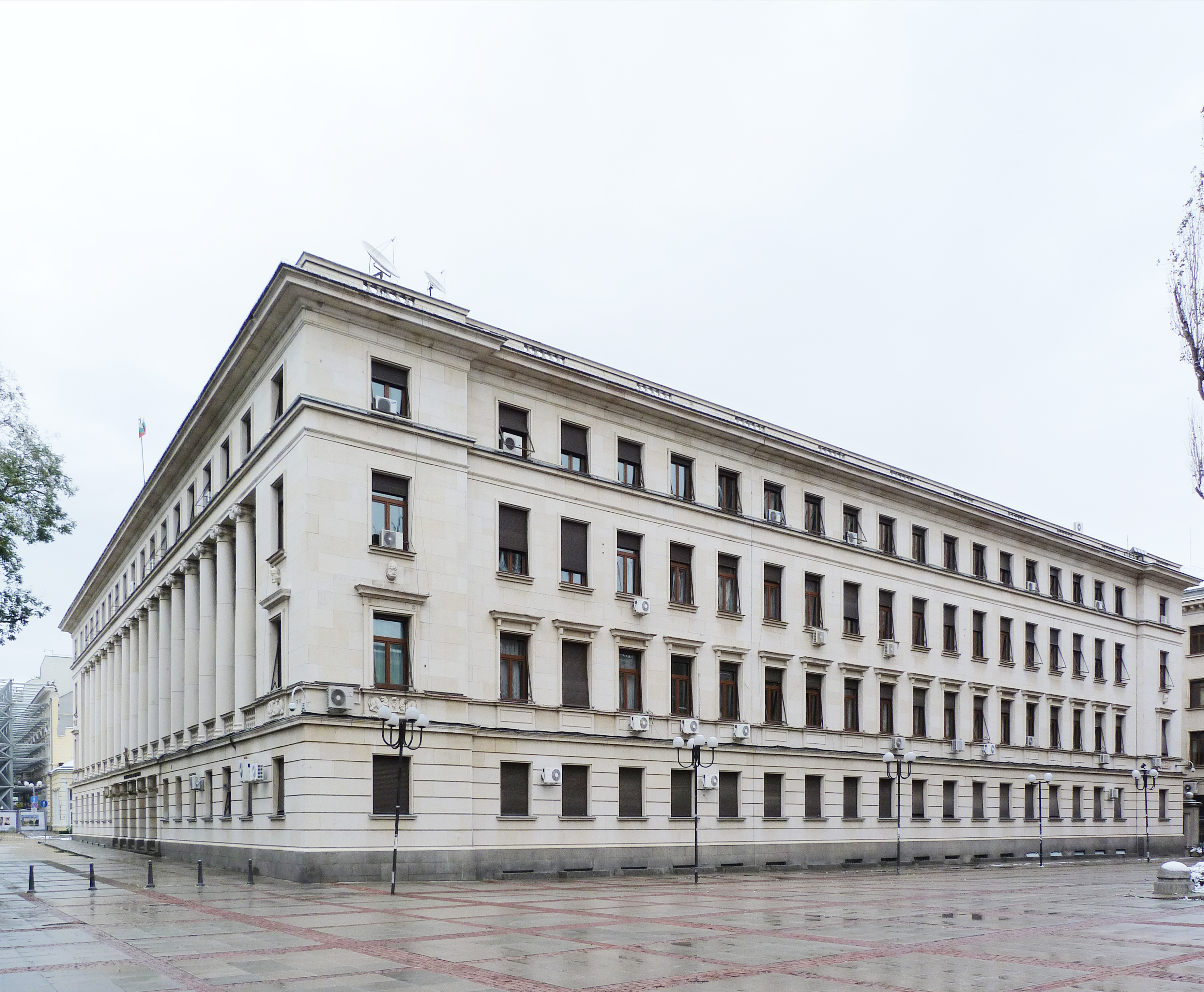 La bulgara ministeriejo pri defendo en Sofio (BG).